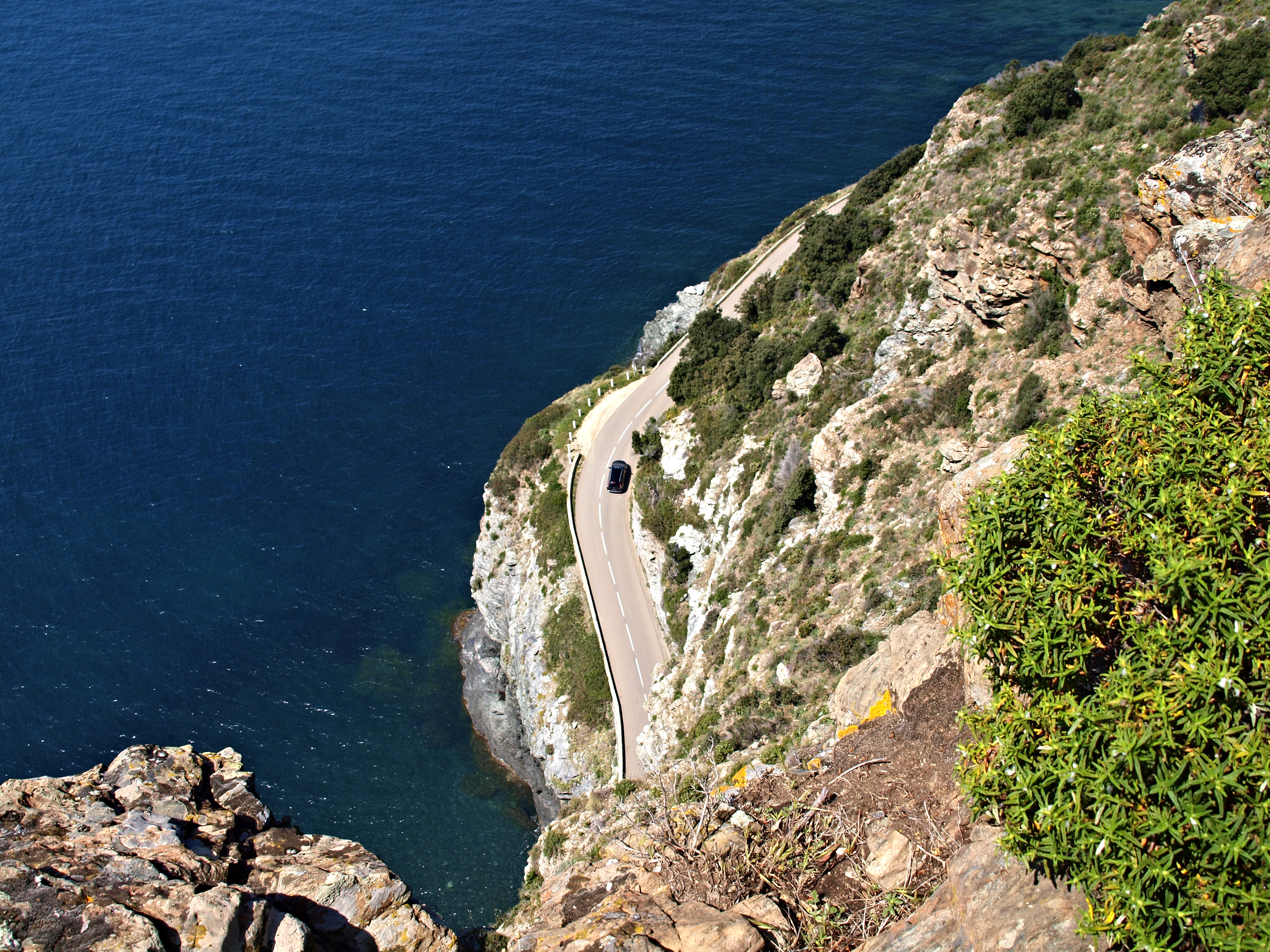 Nonza (Corsica) - Vue de la route D80 depuis la D433 menant à Olmeta-di-Capocorso